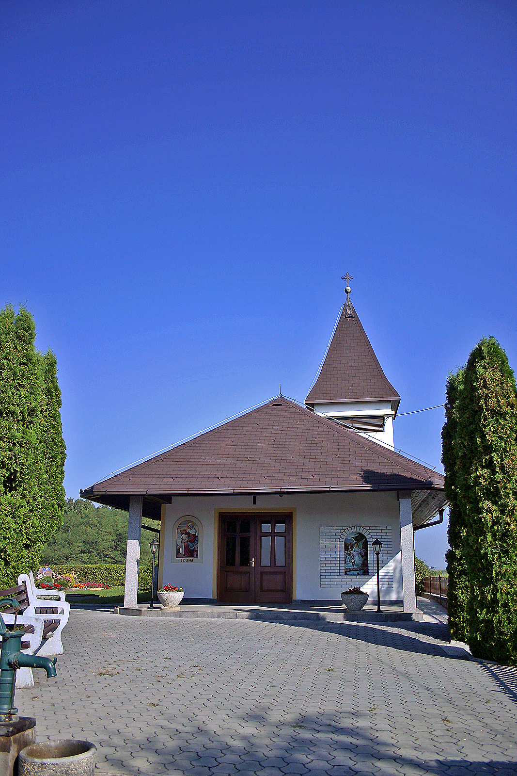 Kapela svete Ane, Krašči. Holy Anna chapel, Krašči. Heilige Anna Kapelle, Krašči.